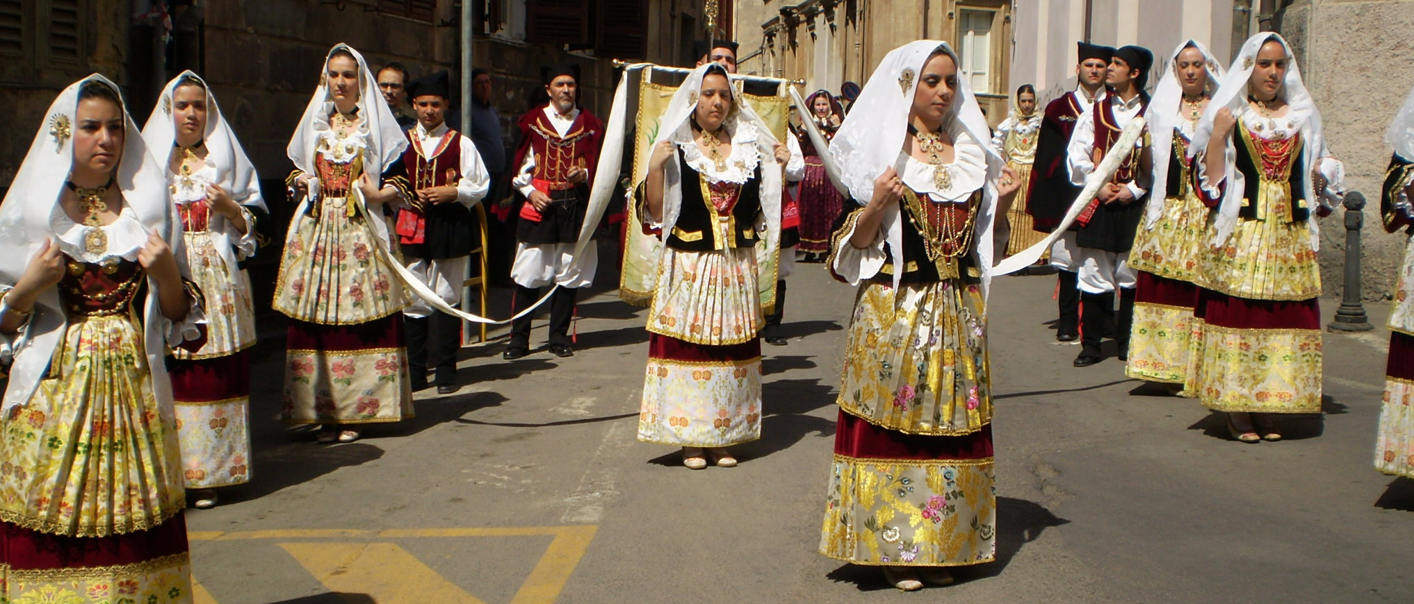 Costume di Sinnai